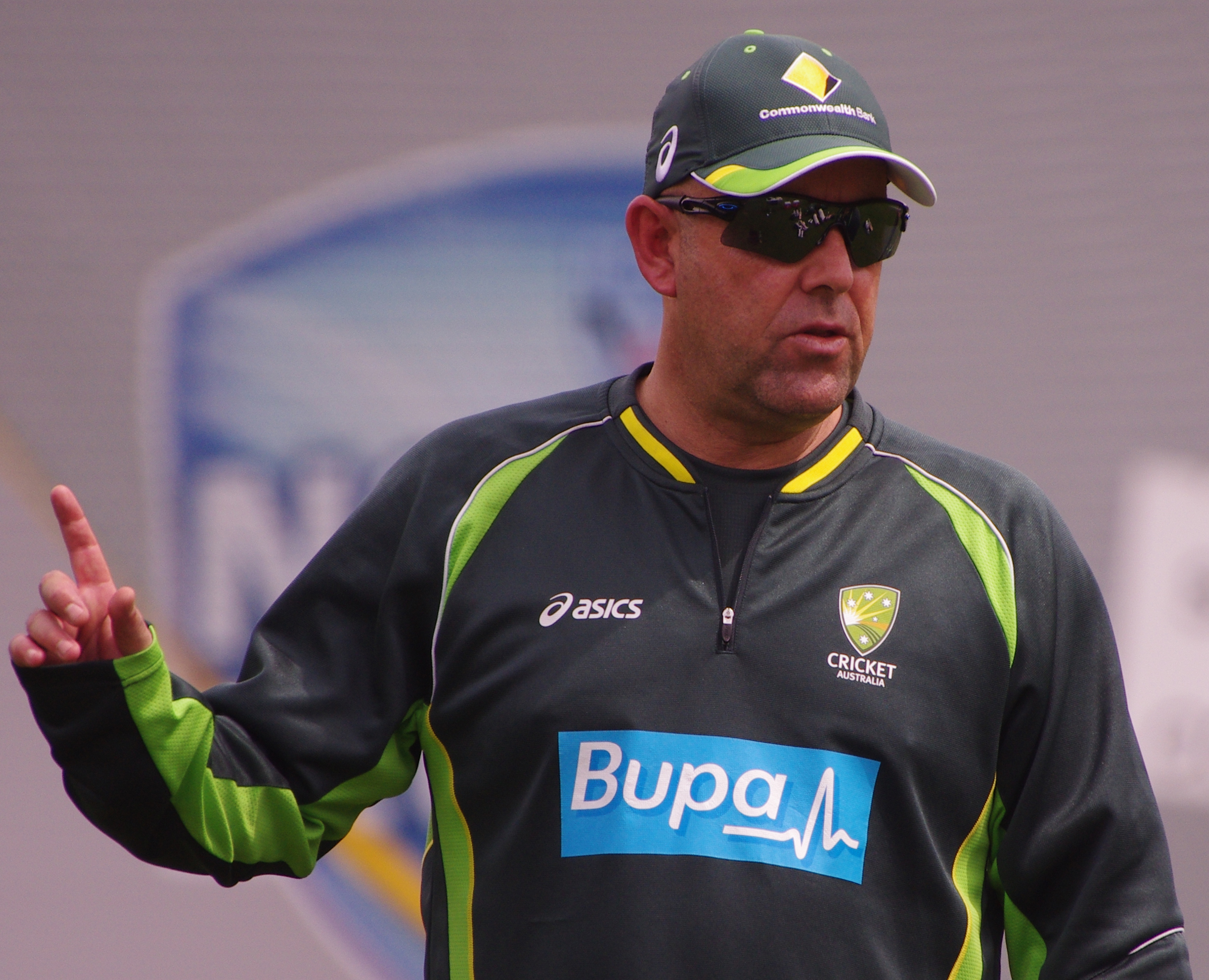 DARREN LEHMANN